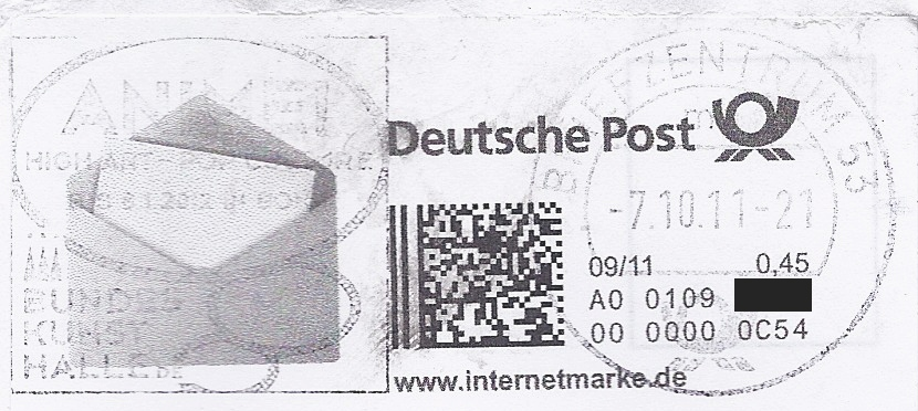 Beispiel für eine vom Briefzentrum fehlerhaft bearbeitete Internetmarke